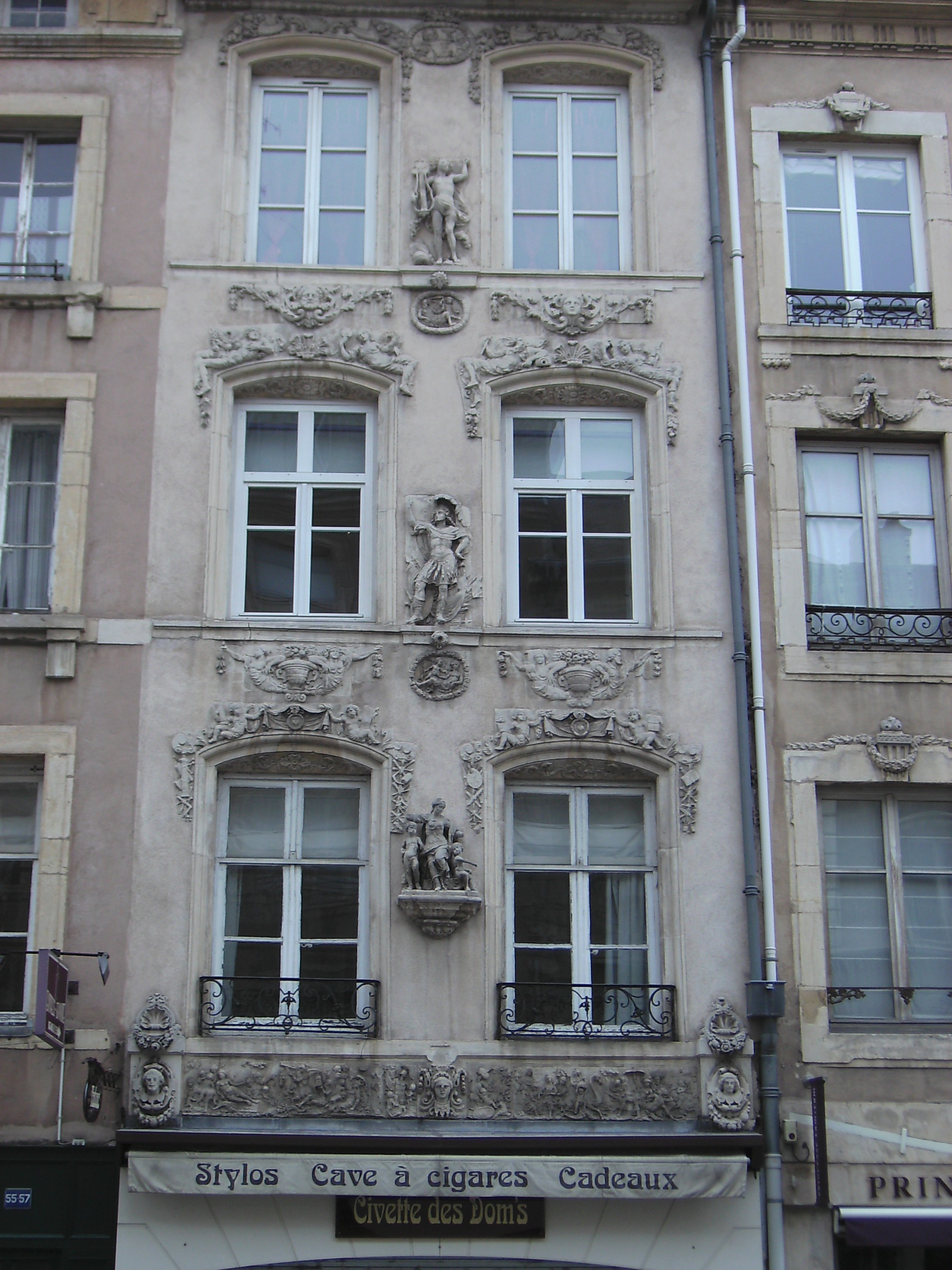 Jacob-Sigisbert Adams Haus, rue des Dominicains, Nancy Das fotografierte Haus ist kein Jugendstilhaus. Es gehörte einer Bildhauerfamilie aus dem 18. Jh.